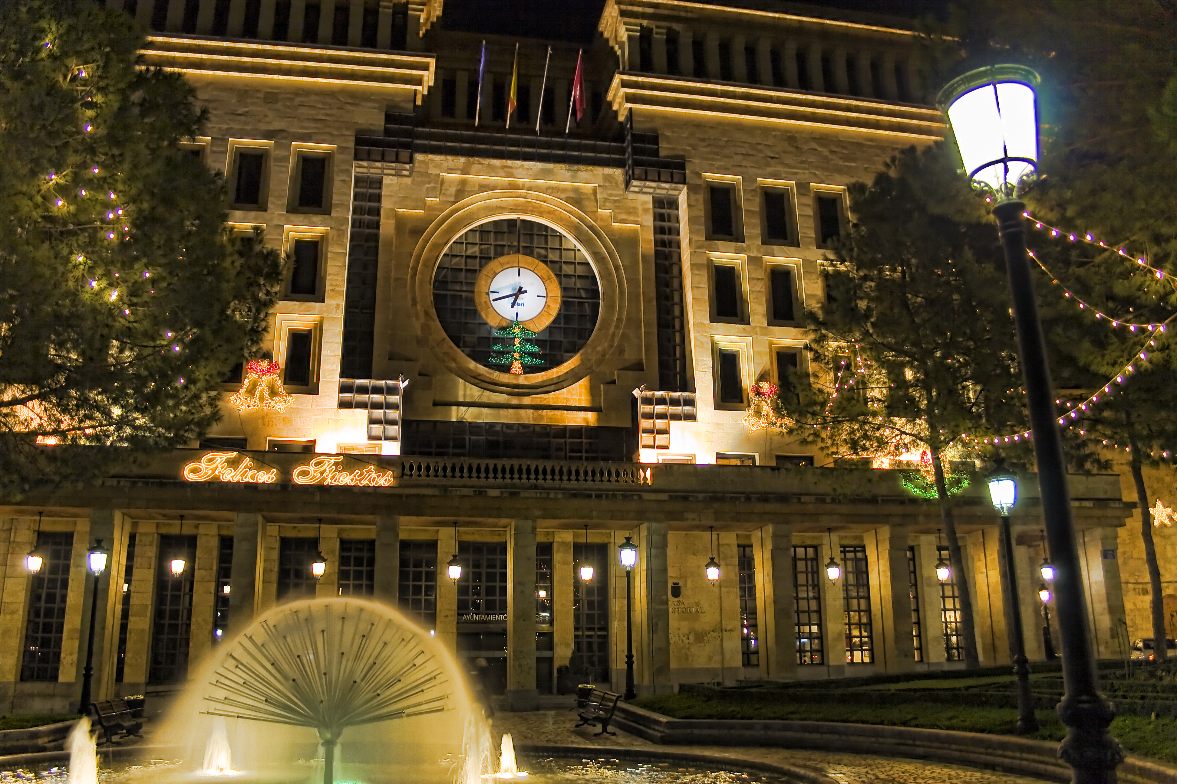 Iluminación navideña del Ayuntamiento de Albacete. Más austera que otros años, quizás por la crisis. Esta foto también es de las que hice para el Photowalk. Se puede ver en